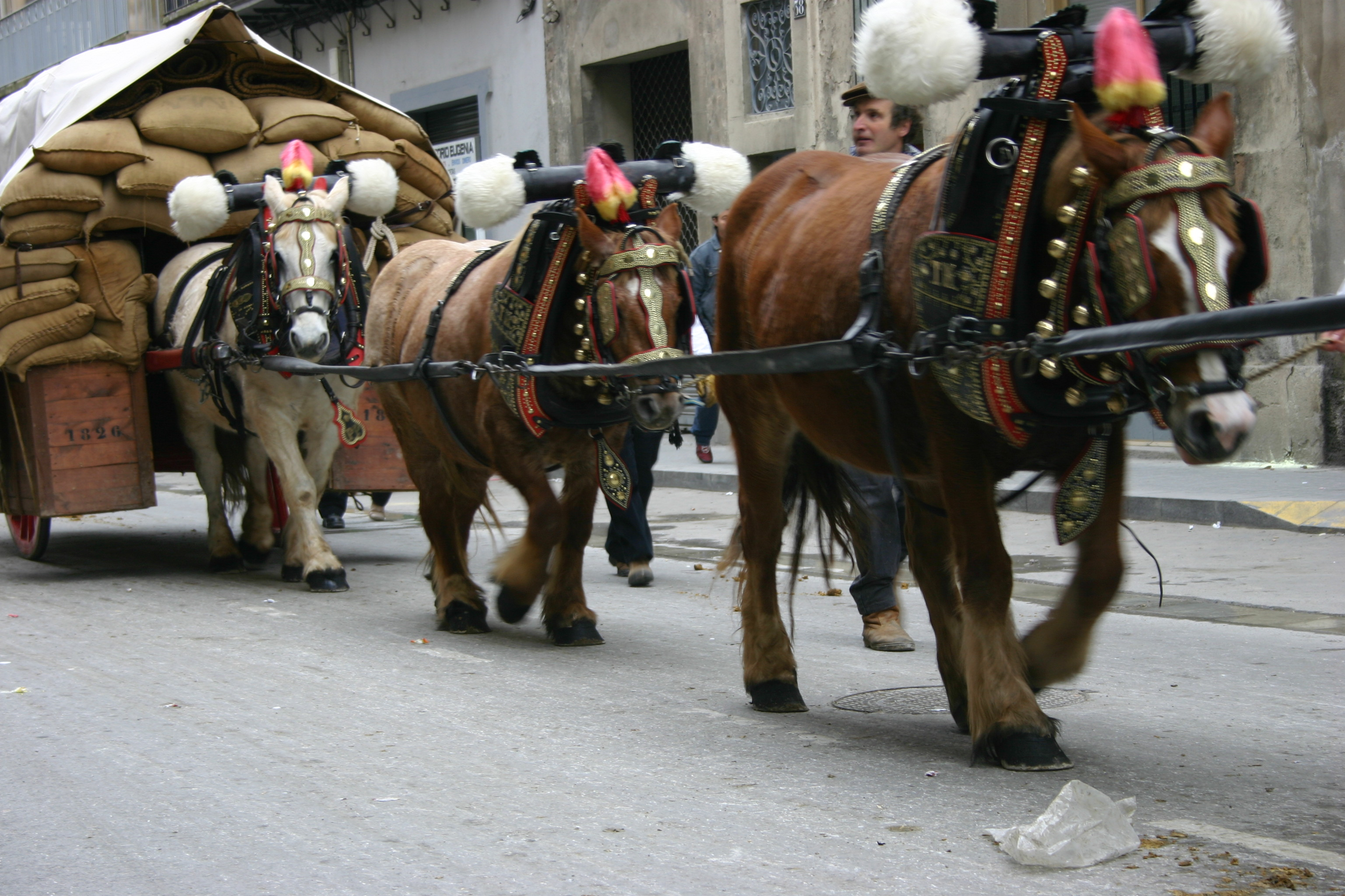 Processó dels tres tombs a Igualada